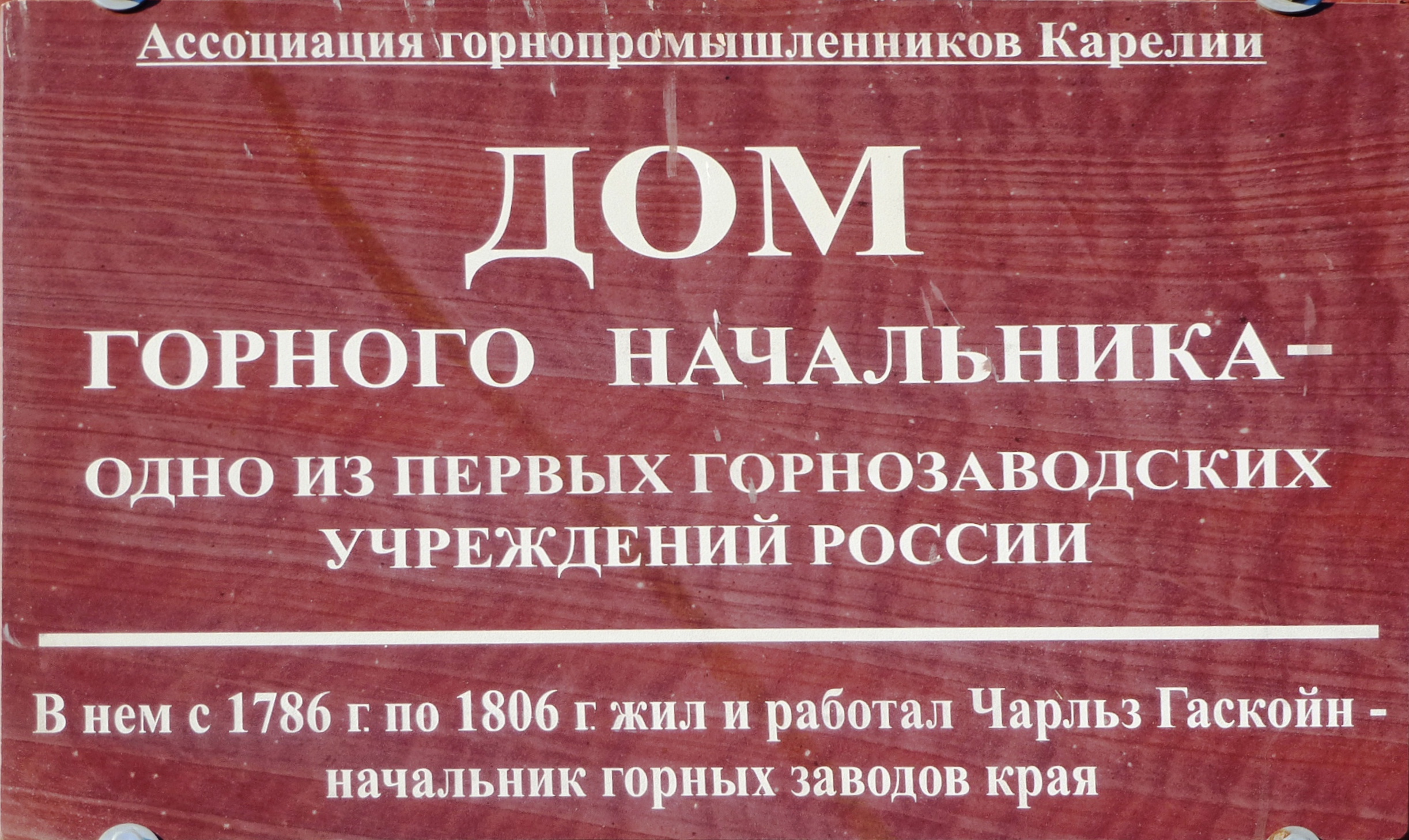 Памятная доска. Петрозаводск, ул. Энгельса